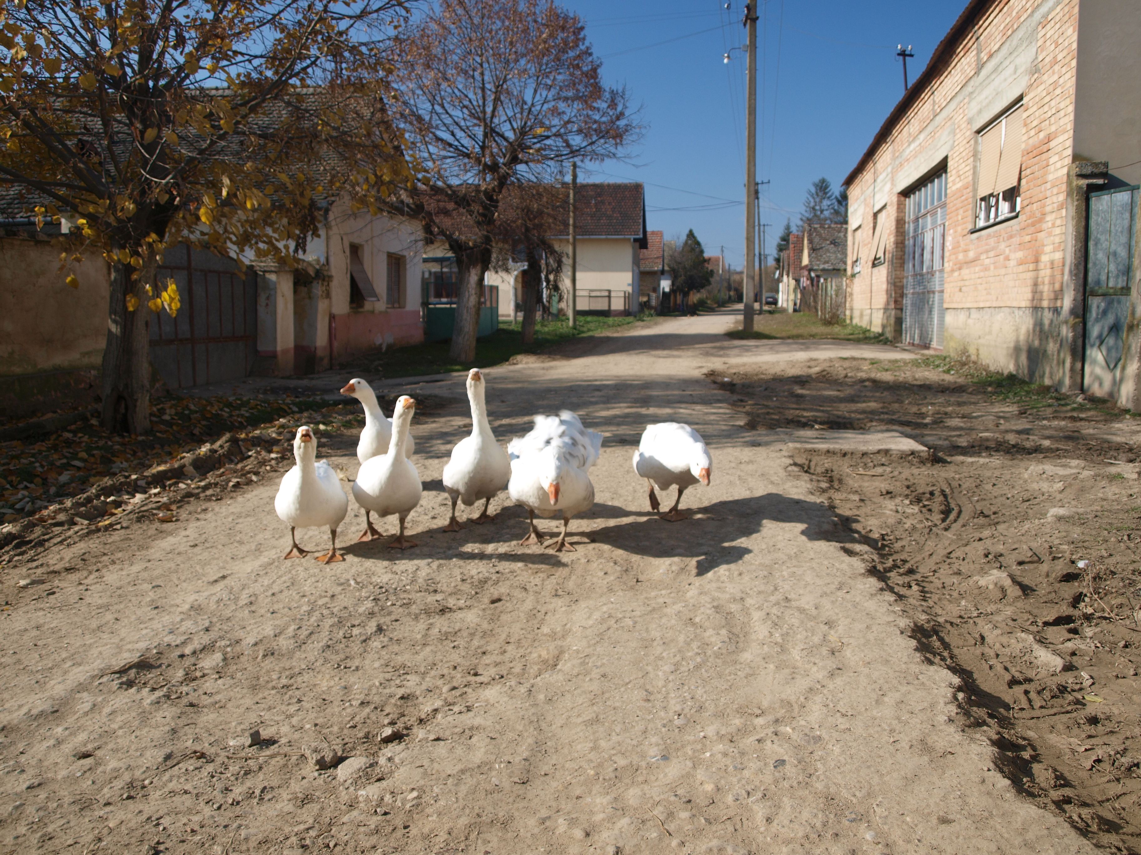 prizor sa ulice u Suseku.